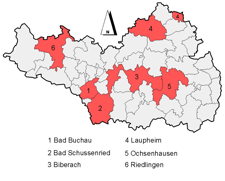 Übersicht über die Verwaltungsgliederung des Landkreises Biberach. Hervorgehoben sind die sechs Städte, restliche Flächen stellen die 39 Gemeinden dar.